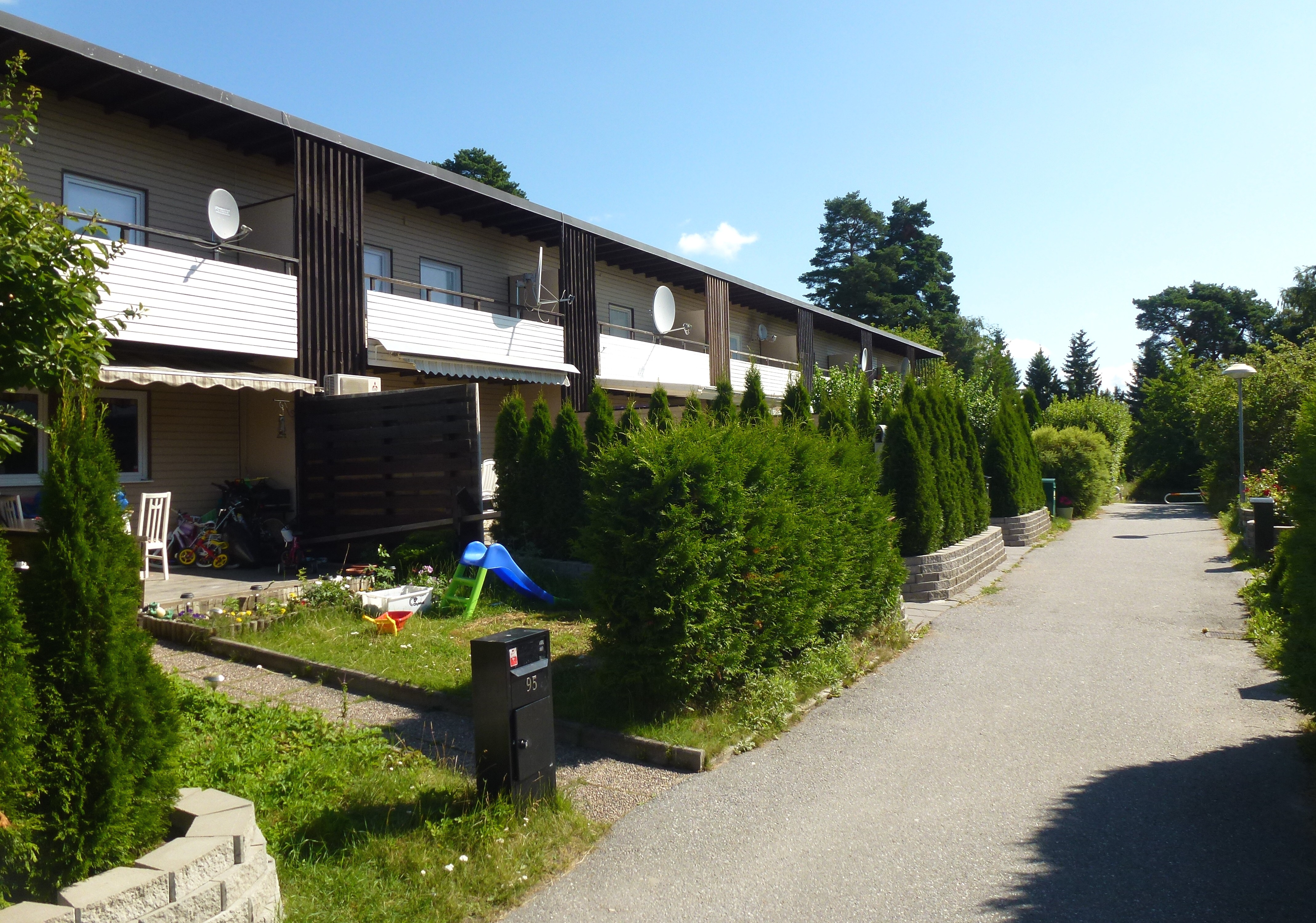 Småhusbebyggelse i Kälvesta Björnidevägen